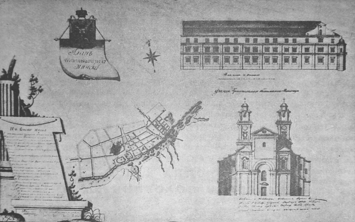 Беларуская (тарашкевіца): Пінск (Pinsk), пляц Рынак (plac Rynak). Сьвятога Станіслава і калегіюм езуітаў, абмеры